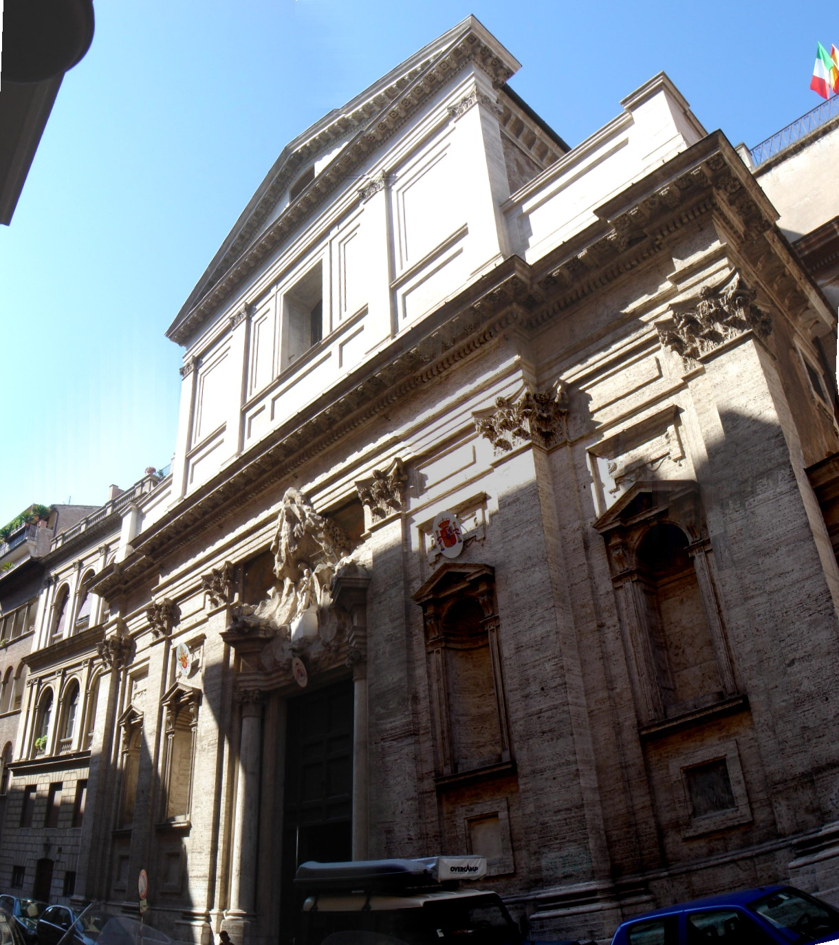 Roma, Santa Maria di Monserrato